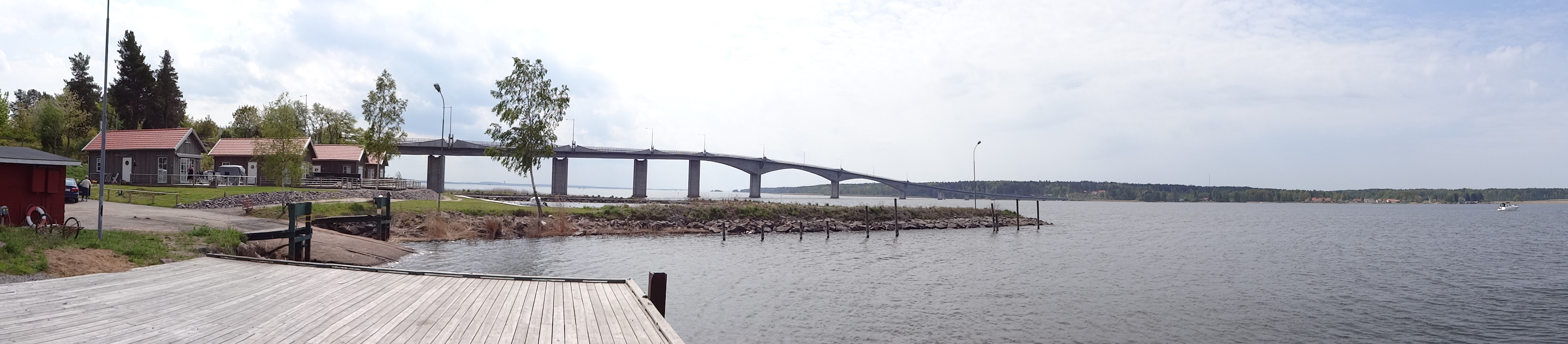 Bron från Vänerns östsida till Torsö